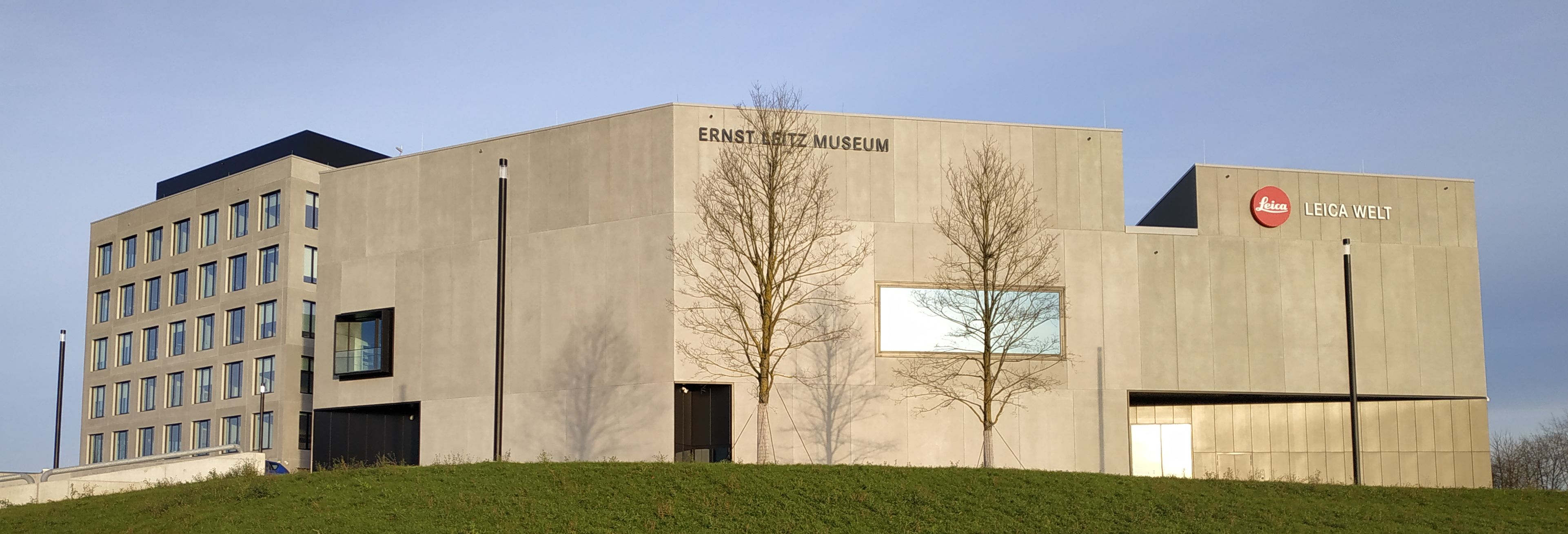 Gebäude der Leica-Welt mit Ernst-Leitz-Museum